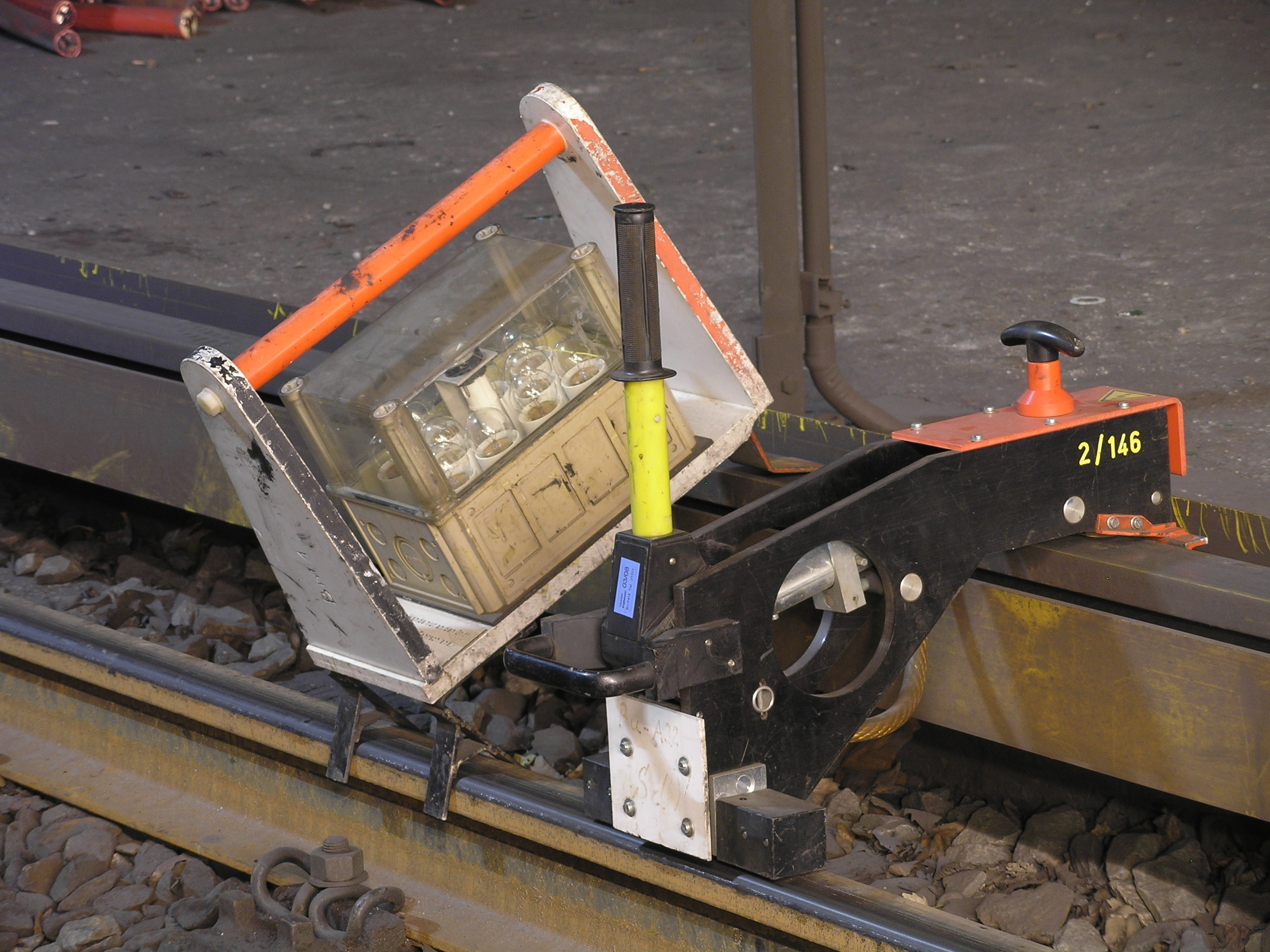 Kurzschließer (rechts) und Stromprüfkasten (links) im Berliner Kleinprofil-U-Bahn-Netz, verbinden jeweils die nach oben offene Stromschiene (oben rechts, zwischen den beiden gelben Schutzabdeckungen) mit der daneben liegenden Fahrschiene (unten links), fotografiert im U-Bahnhof Nollendorfplatz während der Sperrung der Linie U1 zwischen den Bahnhöfen Wittenbergplatz und Gleisdreick